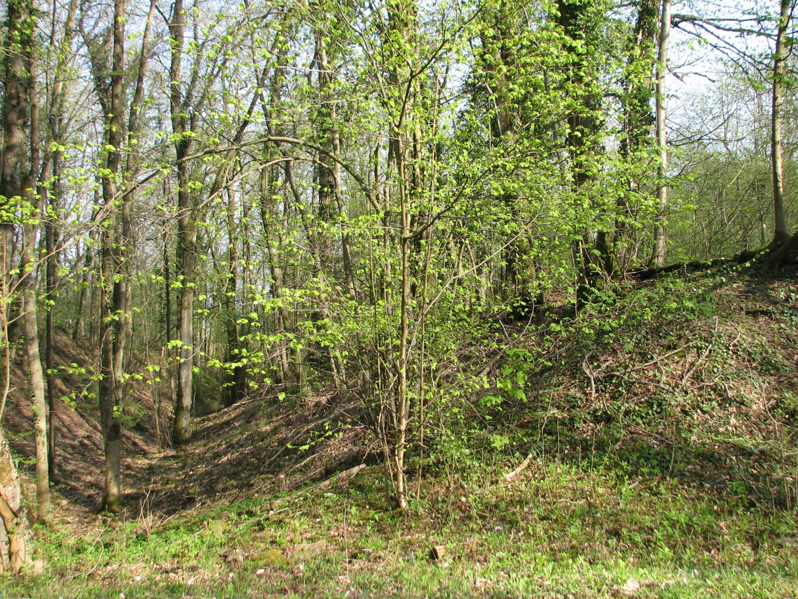 Fossés, vestiges de la Cité d'Affrique, près de Messein en Meurthe-et-Moselle